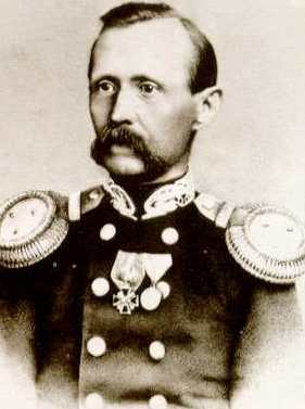 Контр адмирал Маневский А.С.